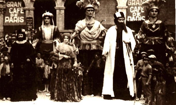 Gigantes de Reus bicentenarios